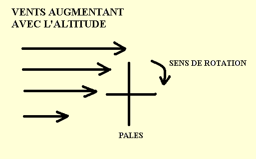 Diagramme montrant la rotation horizontale engendré par une variation des vents selon la verticale.